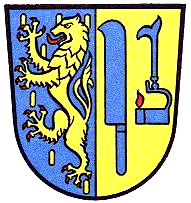 Wappen des ehemaligen Kreises Siegen in Deutschland